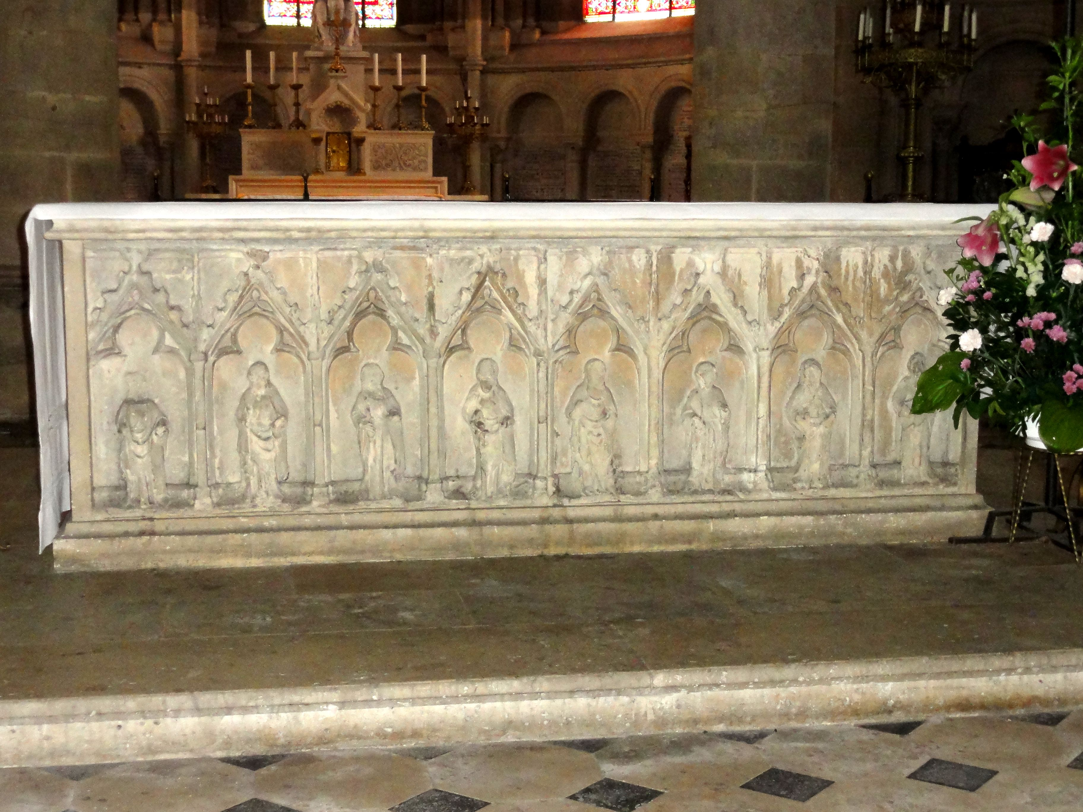 Maître-autel de la première moitié du XIVe siècle, provenant probablemement de l'église abbatiale de Saint-Louis. Ayant séjourné dans un jardin privé de la Révolution jusqu'en 1977, il a offert à la paroisse par son propriétaire où il remplace le maître-autel conçu par Viollet-le-Duc.